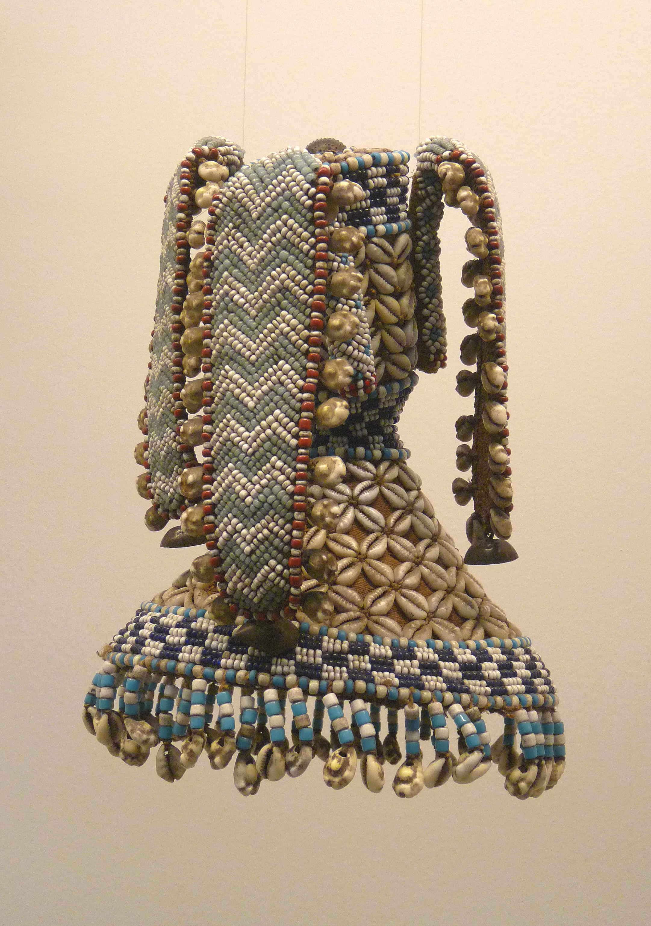 Bushong (Zaïre) : petit chapeau cérémoniel de danse, au Musée royal de l'Afrique centrale